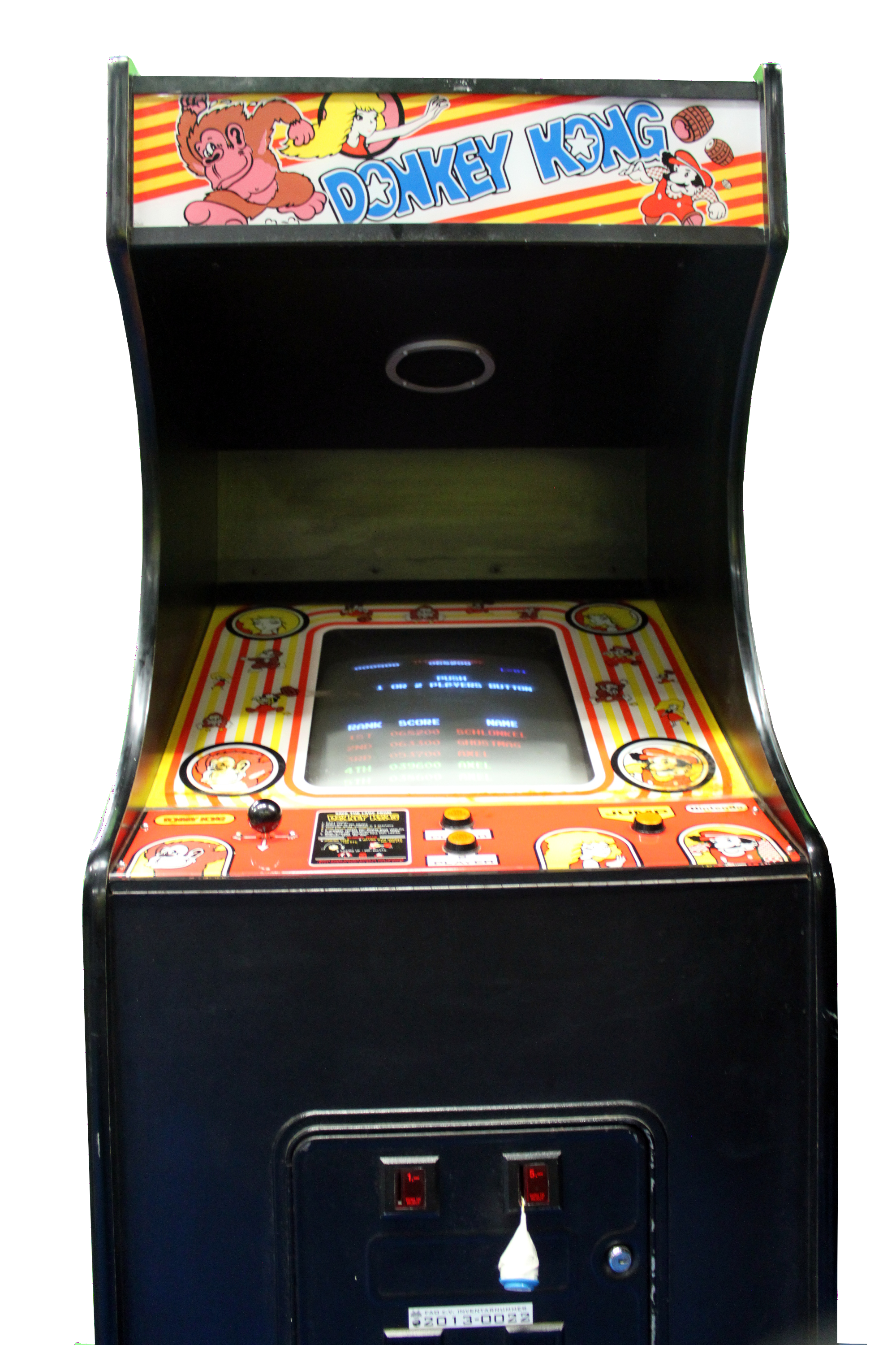 Donkey Kong-Arcadeautomat auf der Gamescom 2014